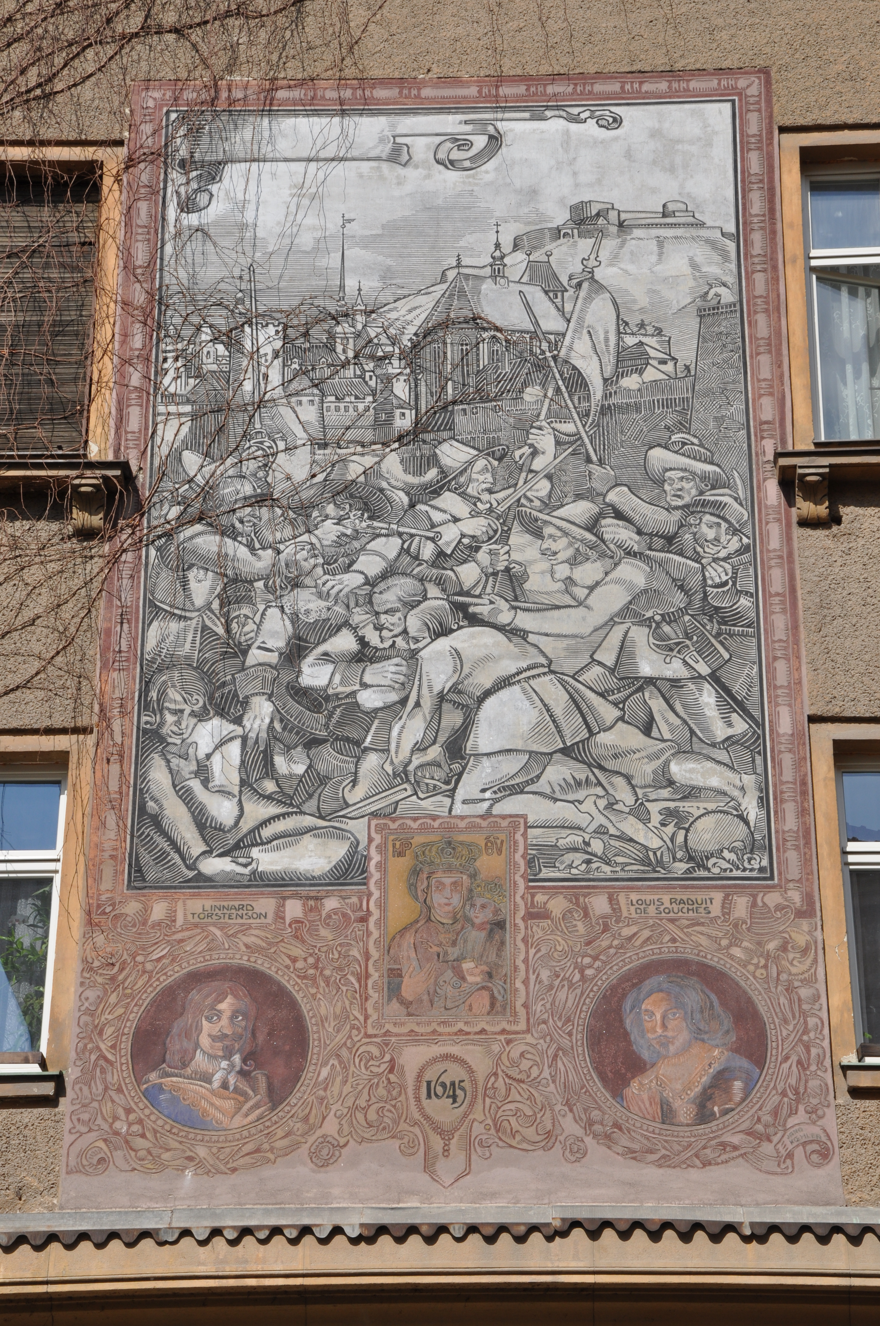 Obrázek z obléhání v roce 1645 na brněnském domě.